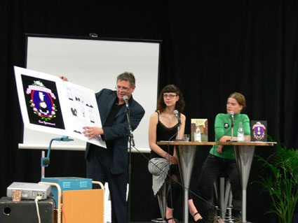 Rolf Classon, Loka Kanarp och Eva Björkstrand på Bokmässan i Göteborg 2006.